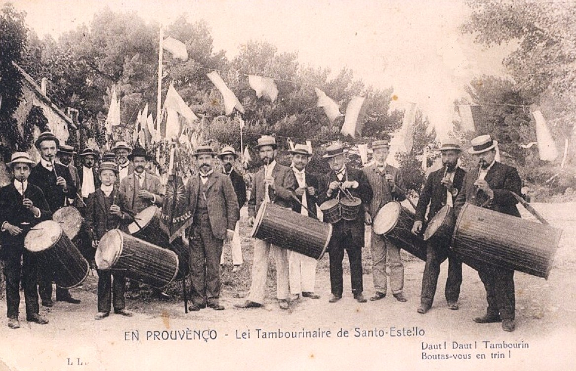 Tambourinaires de la Santo-Estello